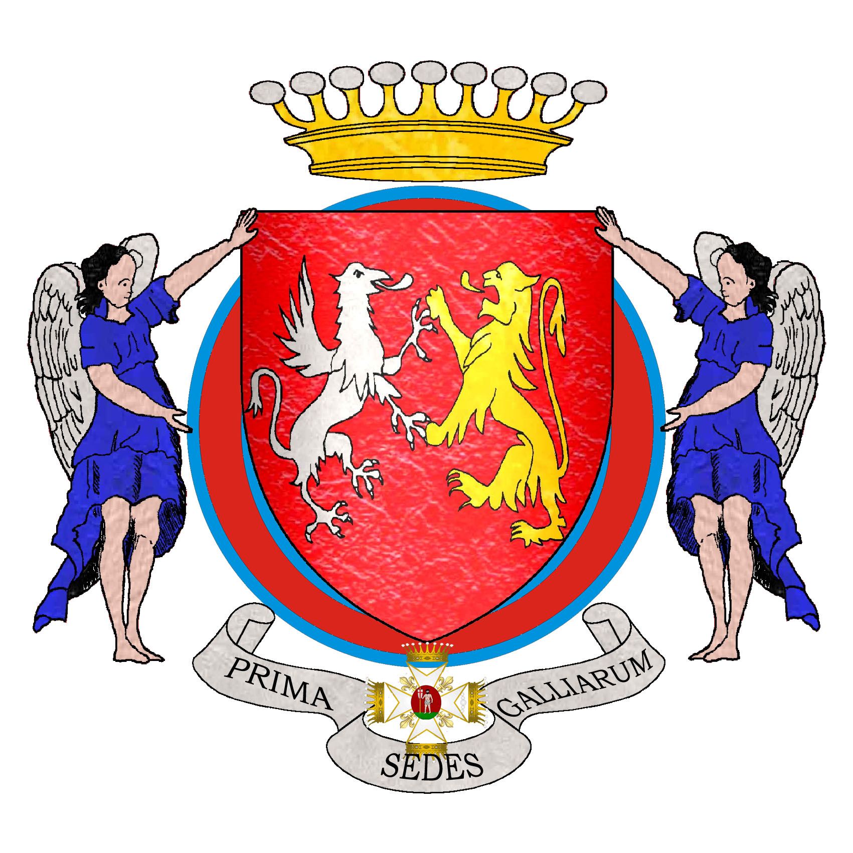 Armes des chanoines-comtes de Lyon - Coat of arms of the Canons-counts of Lyon. Blasonnement: de gueules à un griffon d'argent et un lion d'or, affrontés; l'écu entouré du collier des Comtes de Lyon, timbré d'une couronne de Comte, deux anges pour tenants.